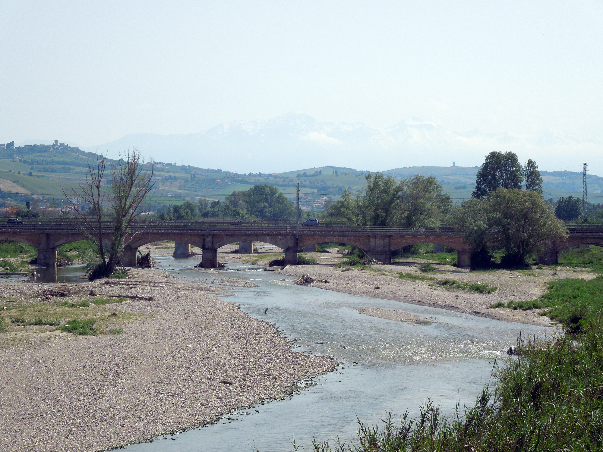 Anse del fiume Tordino nei pressi di Giulianova in provincia di Teramo.